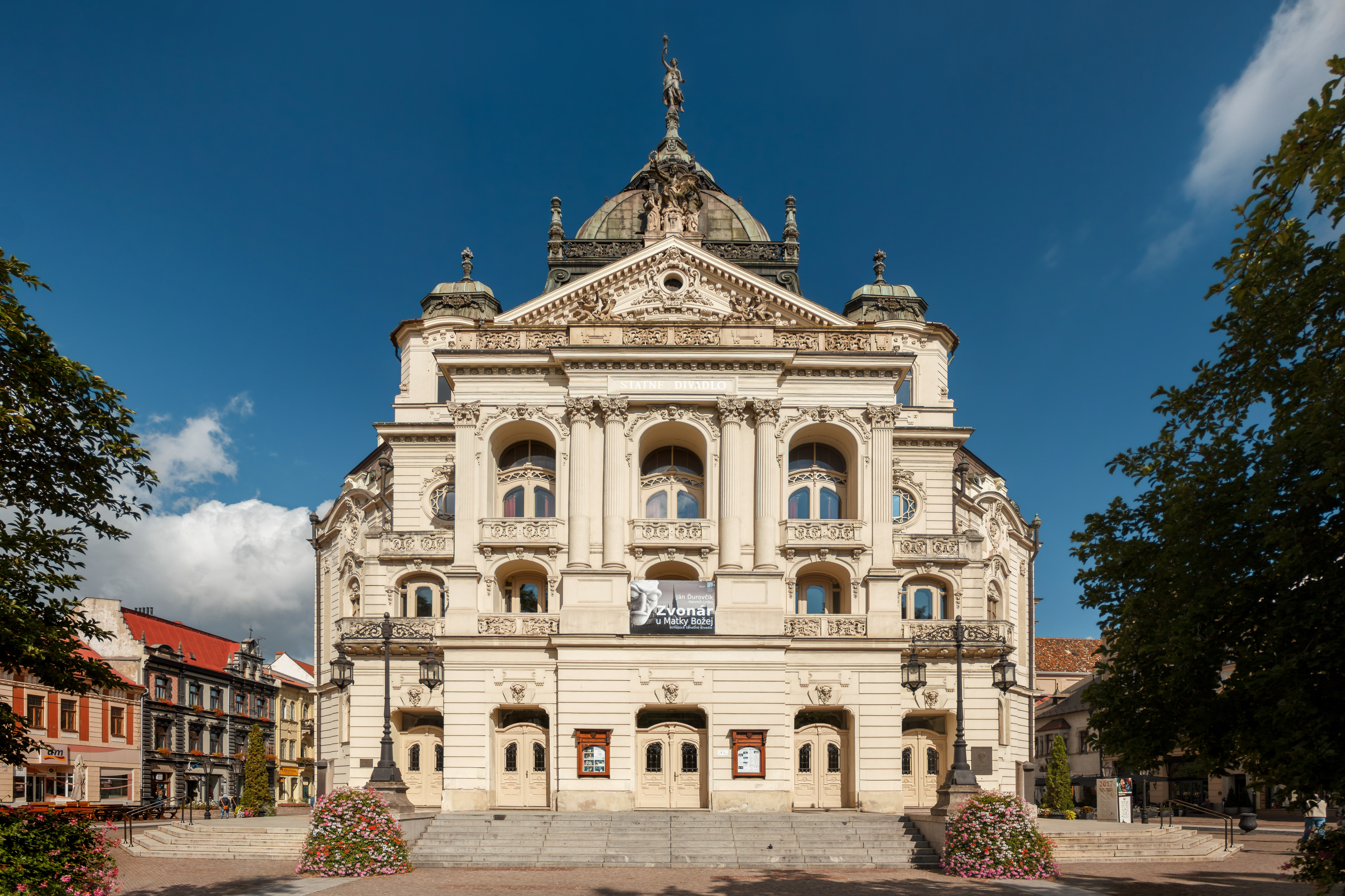 Průčelí historické novobarokní budovy Státního divadla v Košicích, postavené v roce 1899